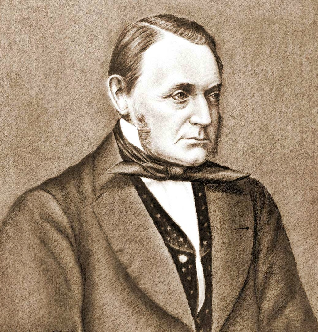 Andreas Albert (1821-1882), Unternehmer, Frankenthal (Pfalz)